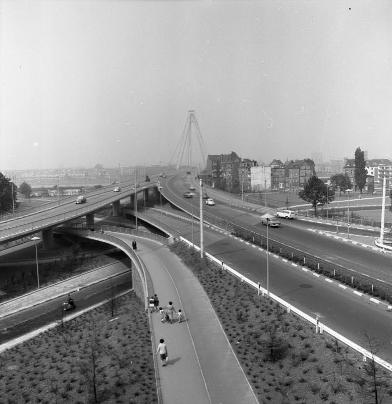 Stadtaufnahme Köln/Severinsbrücke Information added by Wikimedia users.